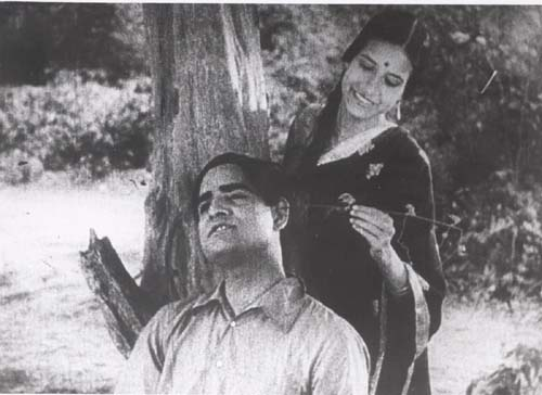 K.L.Siagal, Jamuna in Devdas (1936)